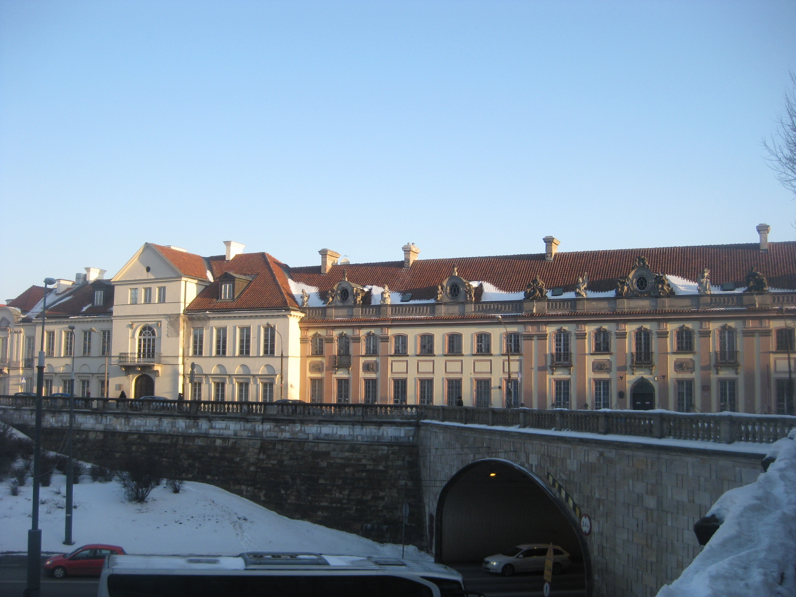 Warszawa, zespół pałacu Branickich